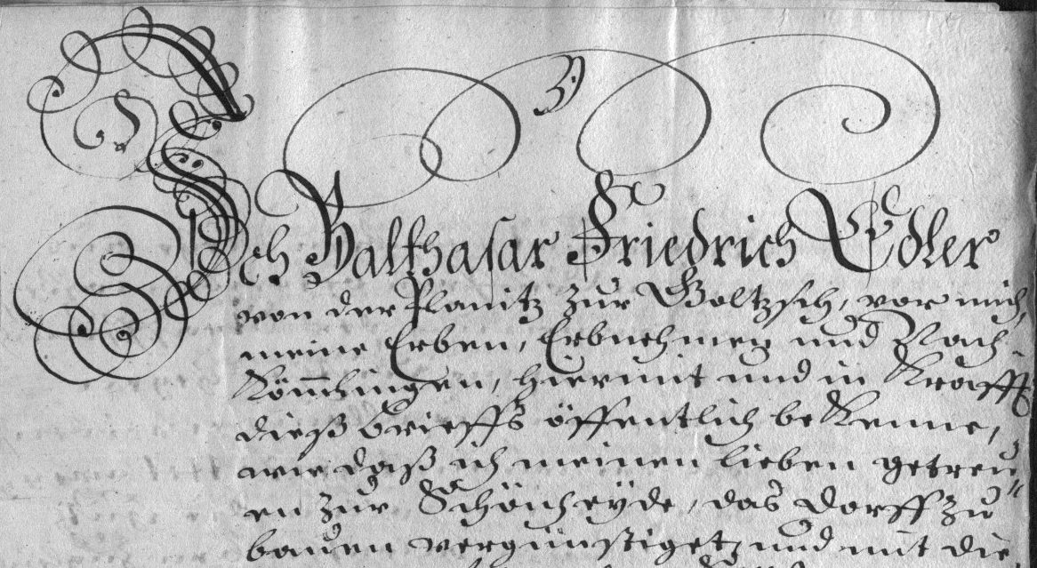 Schönheide im Erzgebirge: Gründungsurkunde - Ausschnitt (Eingangstext) aus einer Abschrift von 1710. Mit dem sog. Befreiungsbrief gründete der Gebietsherr im westlichen Erzgebirge, Balthasar Friedrich Edler von der Planitz, am 20. März 1549 (nach damaligem Kalender, heute 30. März 1549) das Dorf Schönheide als Gemeinde. Dies ist also die Gründungsurkunde für das Dorf Schönheide. Der Textausschnitt hat diesen Wortlaut: Ich Balthasar Friedrich Edler von der Planitz, zur Golzsch, vor mich, meine Erben und Erbnehmern und Nachkommlingen, hiermit und in krafft diß Brieffs offentlich bekenne, Wie daß ich meine lieben getreuen zur Schönheyde, das dorff zubauen vergünstiget … Die Schönheider hatten Ende des 17. Jahrhunderts versucht, ihre ihnen von von der Planitz eingeräumten Rechte sich vom Kurfürsten bestätigen zu lassen. Als Beweis schickten sie im Zuge des sich über mehr als zehn Jahre hinziehenden Schriftwechsels dem Kurfürsten eine Abschrift der Gründungsurkunde.